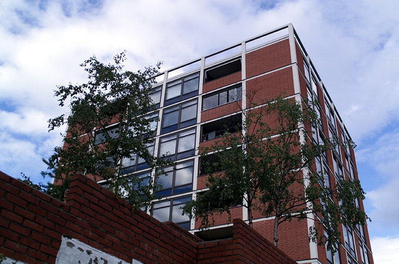 Kuva Olarille tyypillisestä 70-luvulla rakennetusta kerrostalosta.